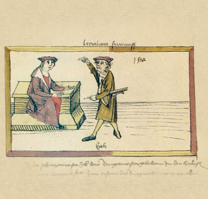 Volkacher Salbuch, Eid des Schützenmeisters vor dem Bürgermeister, folio 446r